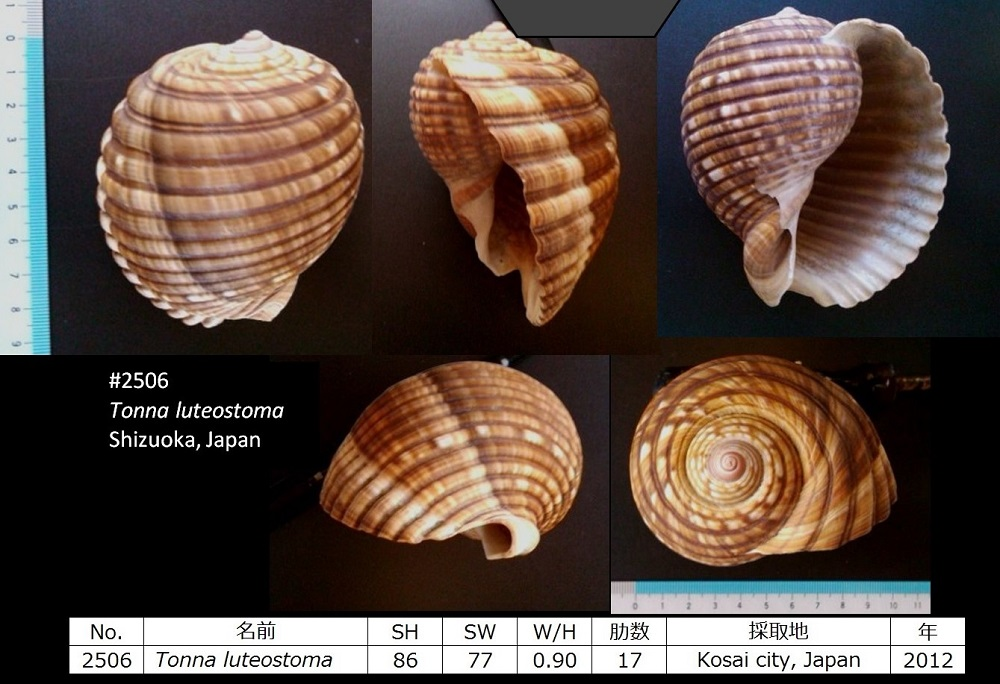 湖西市新居町の浜名湖入口外の砂浜で拾った八代貝